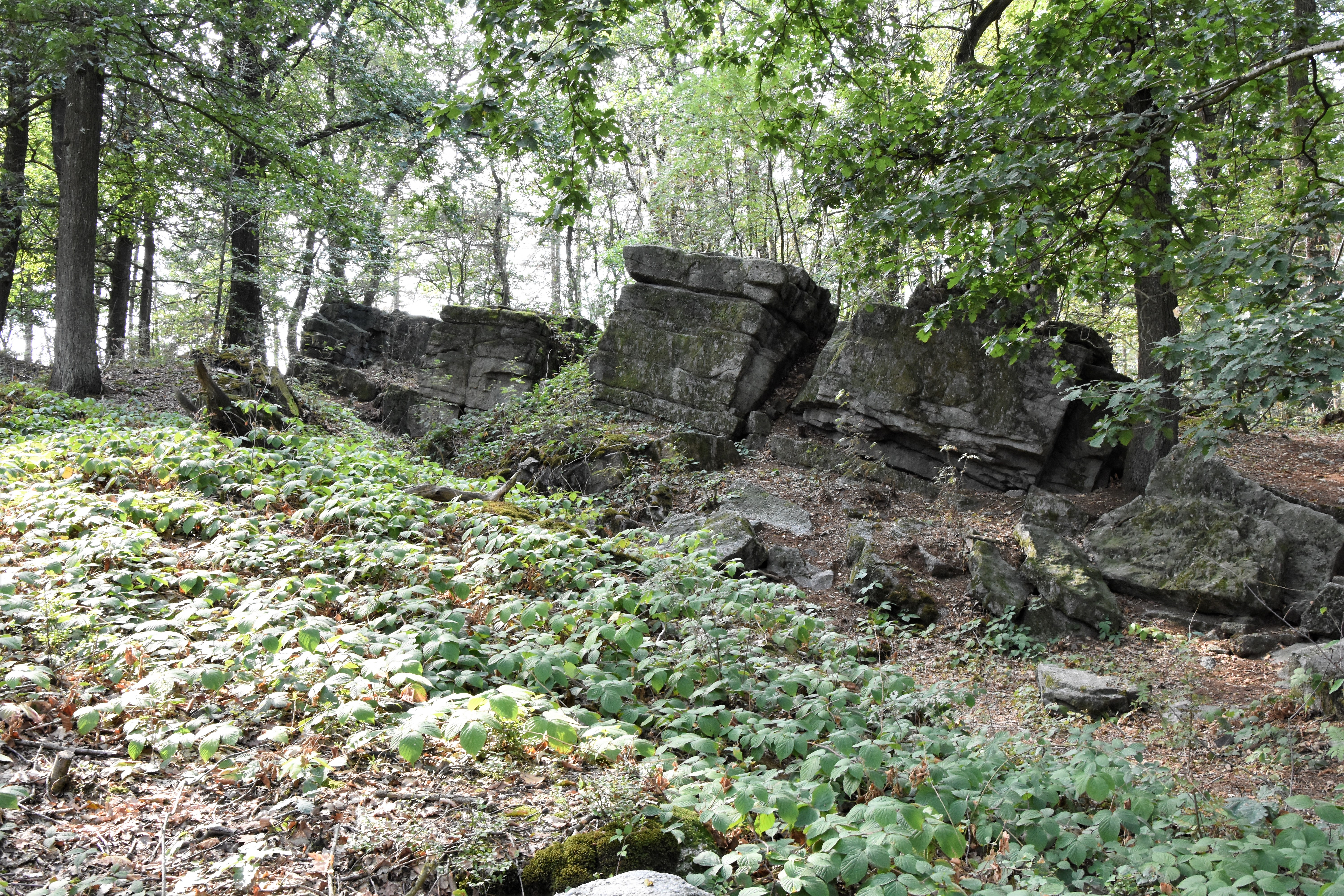 Johannissteine: Felsformation des Karbonsandstein auf dem Piesberg in Osnabrück. Die Johannissteine sind als Naturdenkmal geschützt.